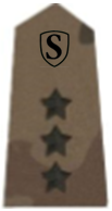 Porucznik ZS